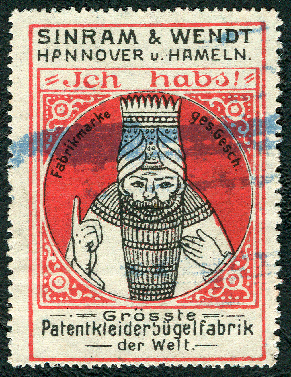 Werbe- oder Reklamemarke von Sinram & Wendt, die hier auf ihre Fabriken in Hannover und Hameln aufmerksam macht (dabei fehlt dem A von HANNOVER ein "Bein"). Unter dem wohl auch als Wortmarke geschützten Begriff "Ich habs!" findet sich die "ges. gesch." Fabrikmarke mit der Abbildung eines wohl sumerischen, mesopotamischen oder griechischen Königs, der mit dem erhobenen Zeigenfinger auf den "Aha"-Effekt seiner Erleuchtung hinweist, zumindest aber auf eine historische, wohlgekleidete Person, die endlich eine Lösung für ein Problem gefunden hat. Sicher nimmt die abgebildete Person Bezug auf eine zur damaligen Zeit in der öffentlichen Wahrnehmung registrierte Persönlichkeit. Das in der englischen Sprache auch als cinderella bezeichnete, gezähnte Werbepapier in Form einer Briefmarke untertitelt auf der Bildseite als "Grösste Patentkleiderbügelfabrik der Welt" ... Grösse der Reklamemarke auf gelblichem Papier ohne Wasserzeichen circa 4,1 cm x 5,4 cm .... Der blaue Tintenstreifen weist auf den Gebrauch der Reklamemark auf einem postalisch befördertem Brief hin ...